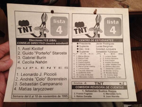 Lista para Centro de Estudiantes de la Facultad de Ciencias Económicas de la Universidad de Buenos Aires del partido Tontos pero No Tanto (TNT), c.1993